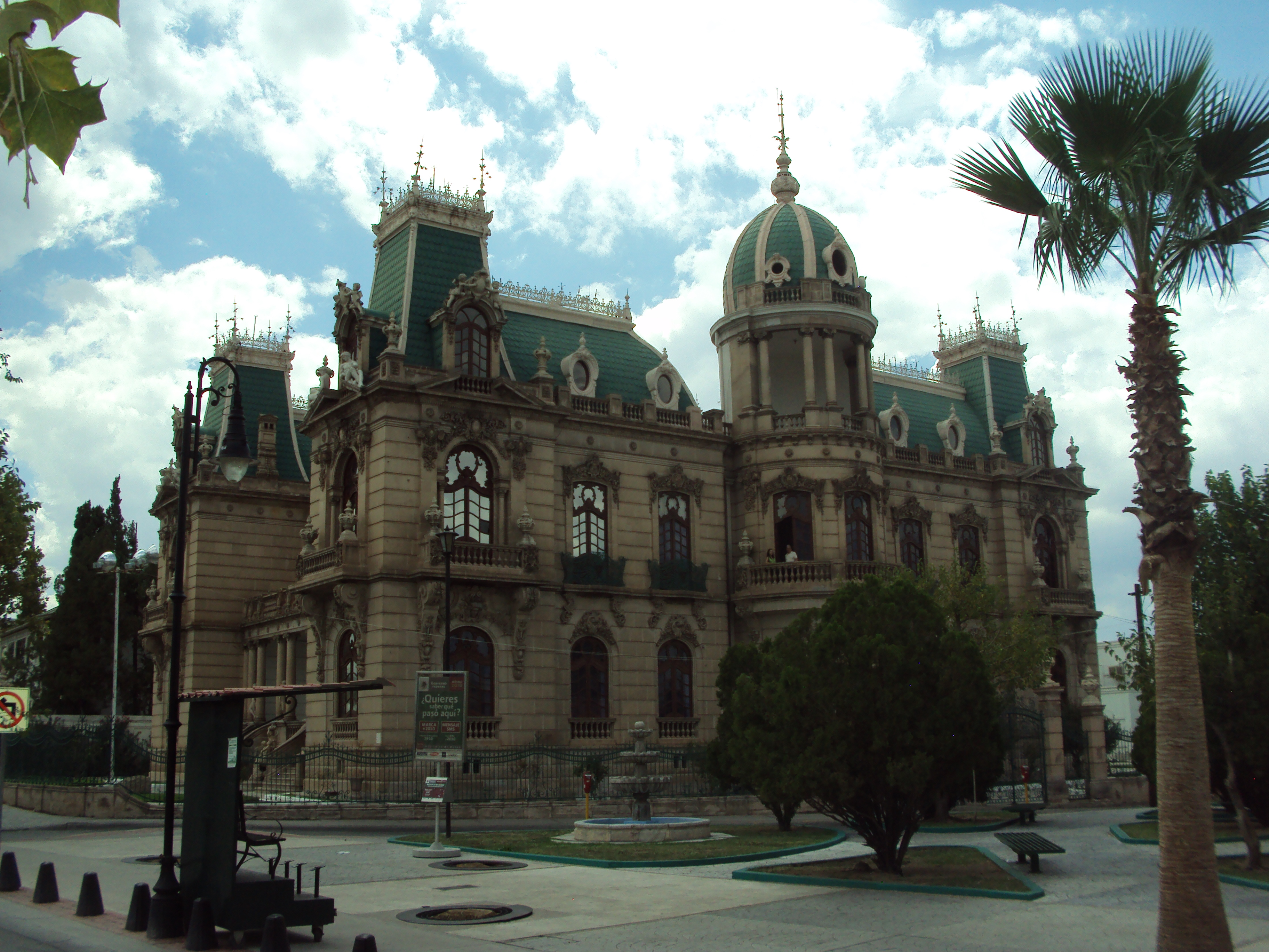 Quinta Gameros, Centro Cultura Universitario de la Universidad Autónoma de Chihuahua